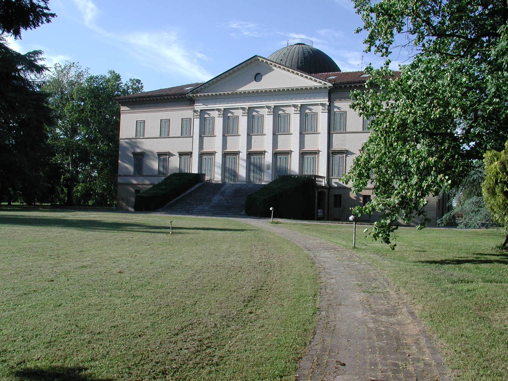 Reggio Emilia, Italy Coviolo Villa Levi